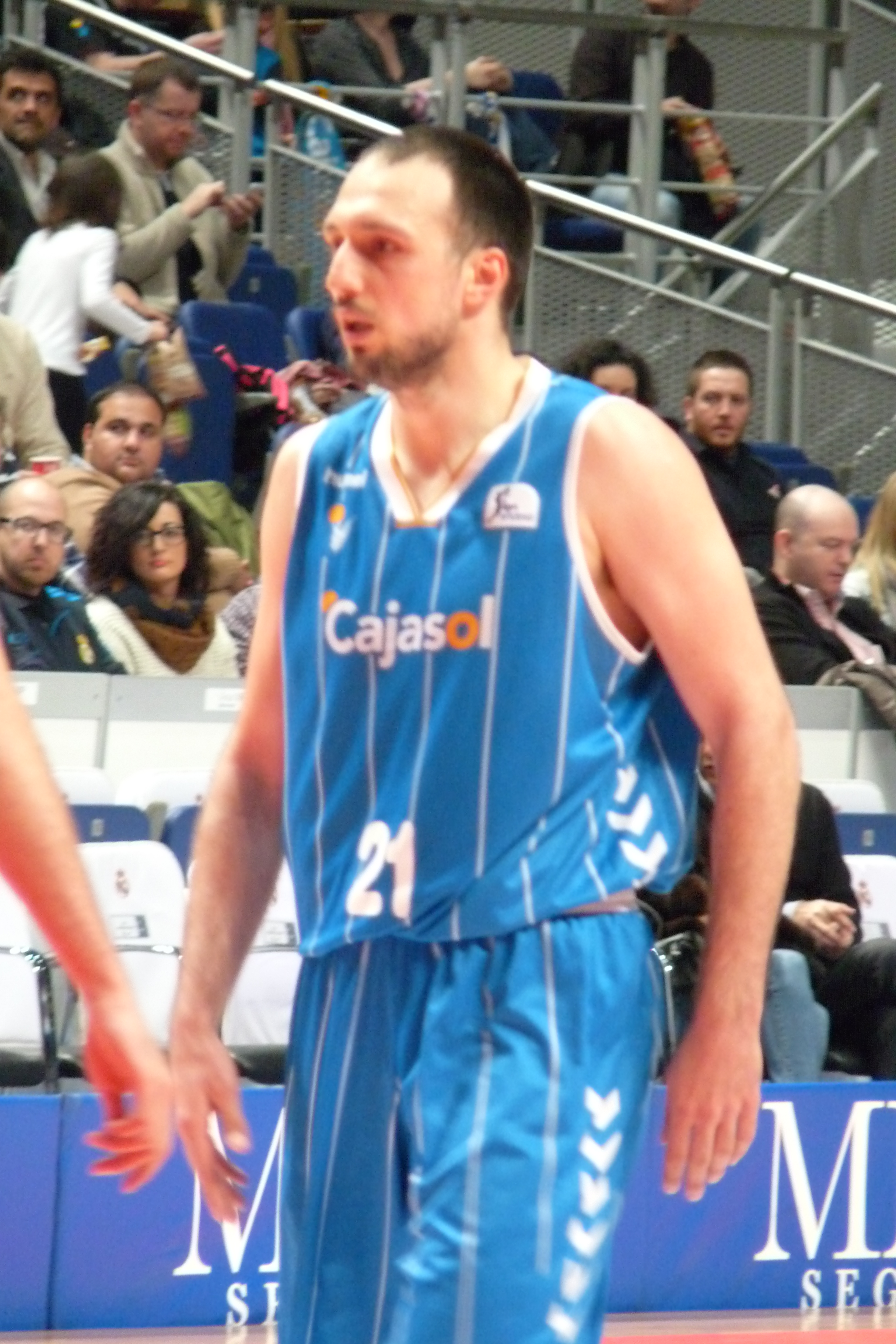 Luka Bogdanović